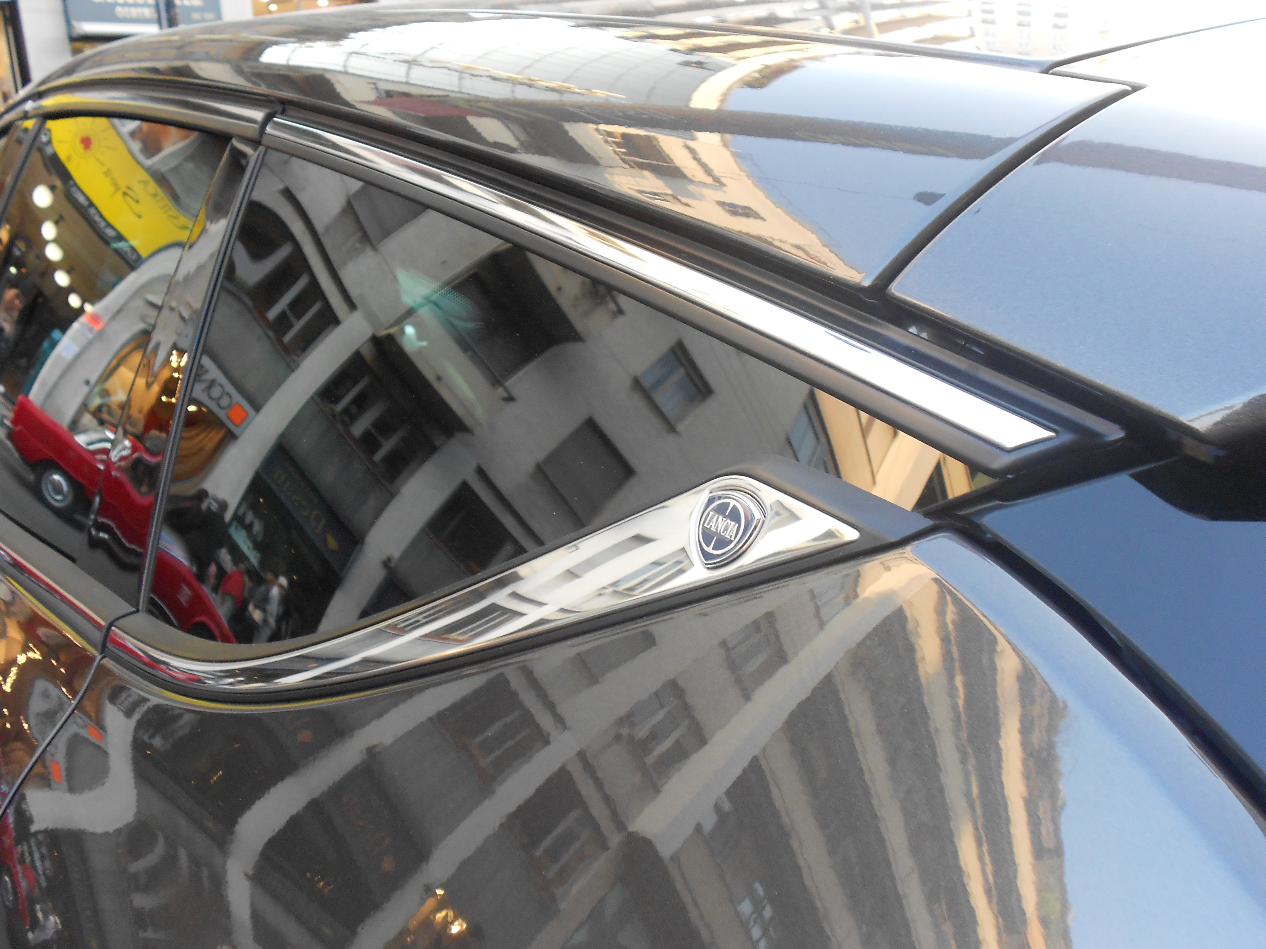 Particolare del montante posteriore della lancia delta